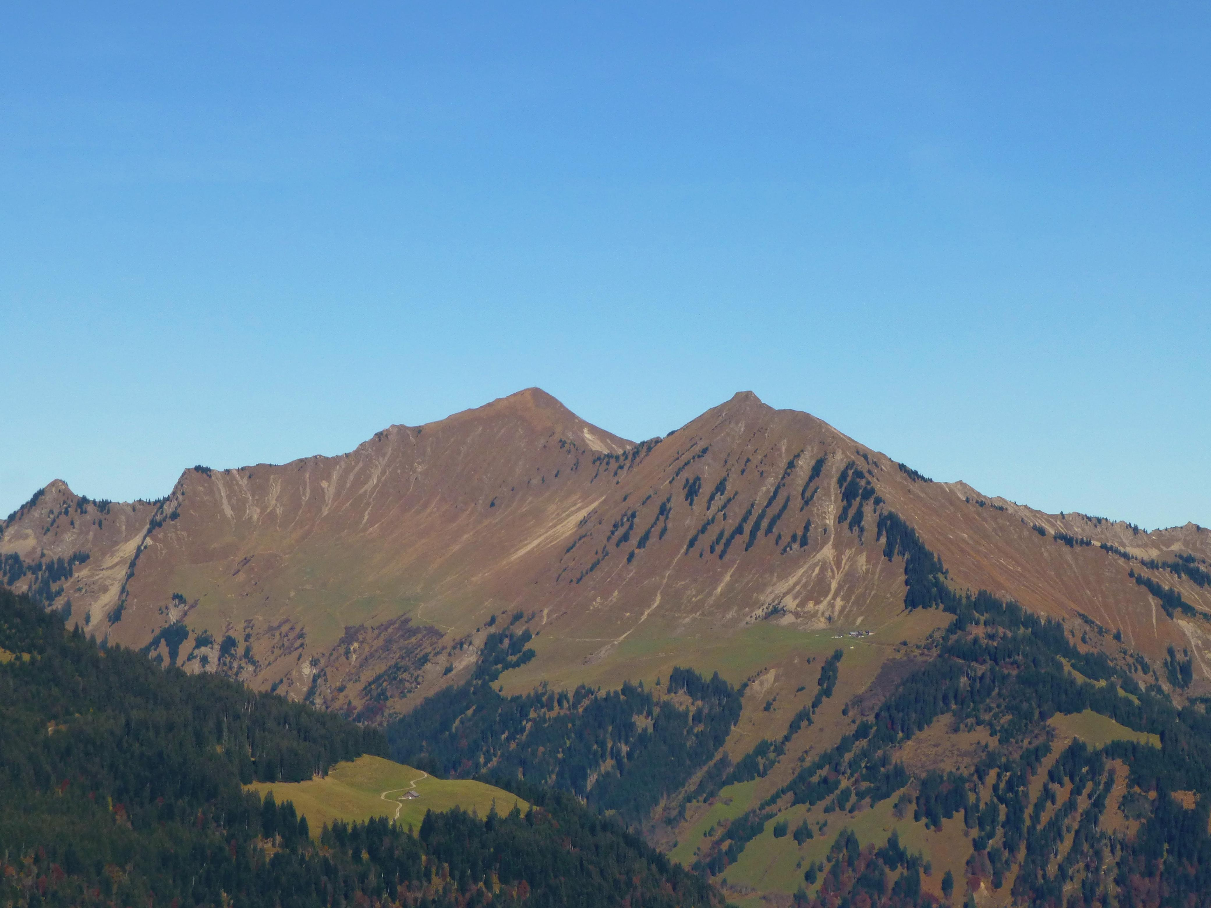 Blick vom Nitzkopf auf die Glatthorngruppe im Bregenzerwaldgebirge